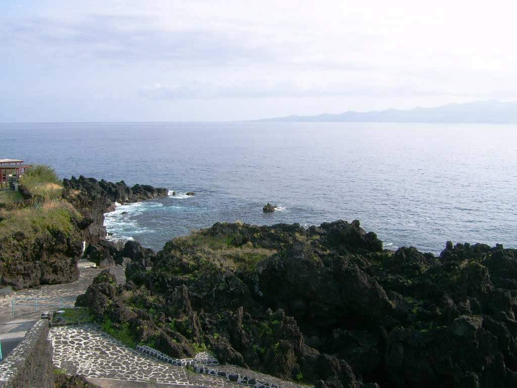 Vista parcial da zona balnear da Fajã Grande, Calheta (Açores), Portugal